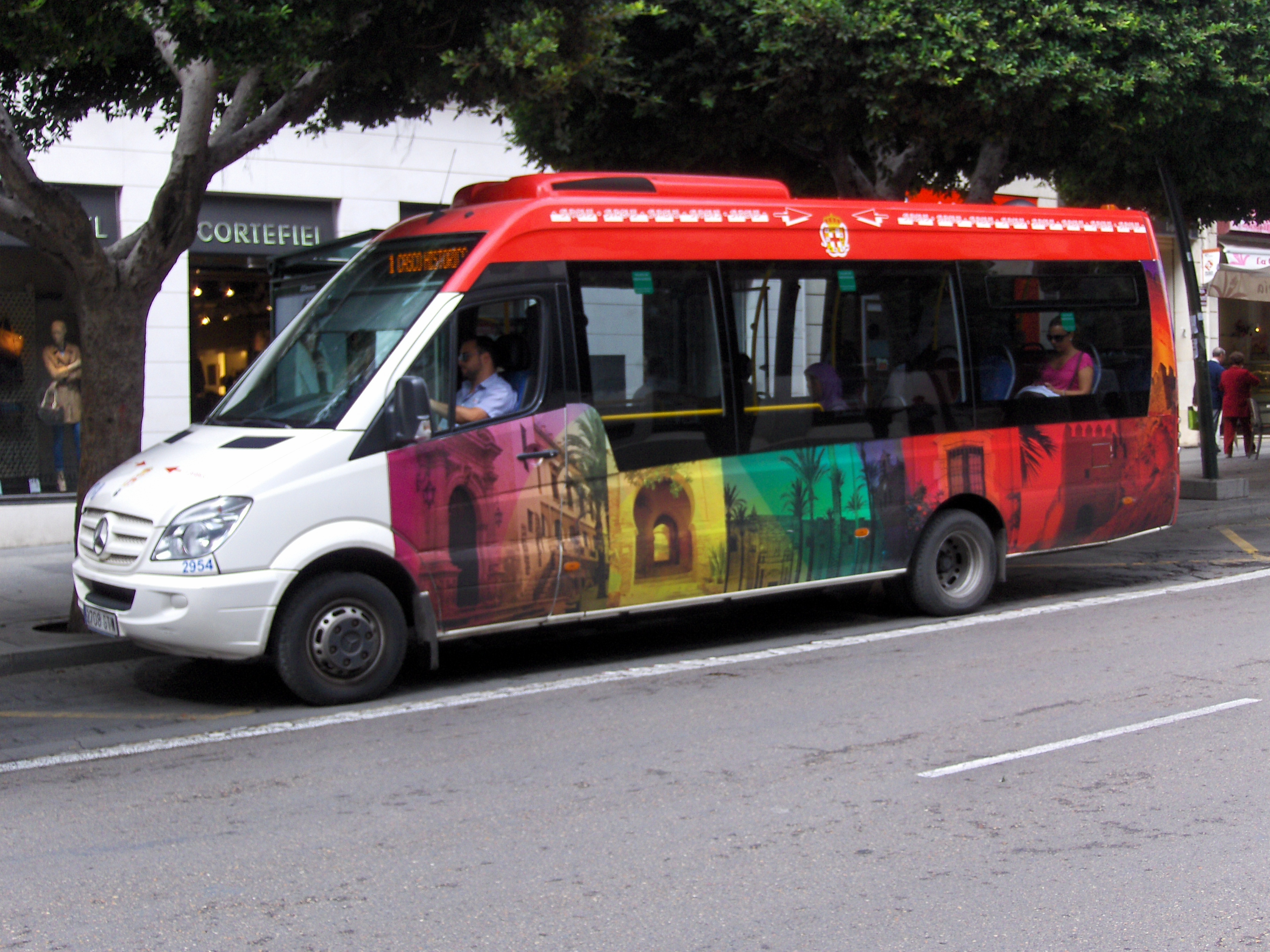 Autobús Mercedes-Benz Sprinter City 65, sirviendo en la línea 1 de los autobuses urbanos en Almería. Matrícula 2708 GTW.